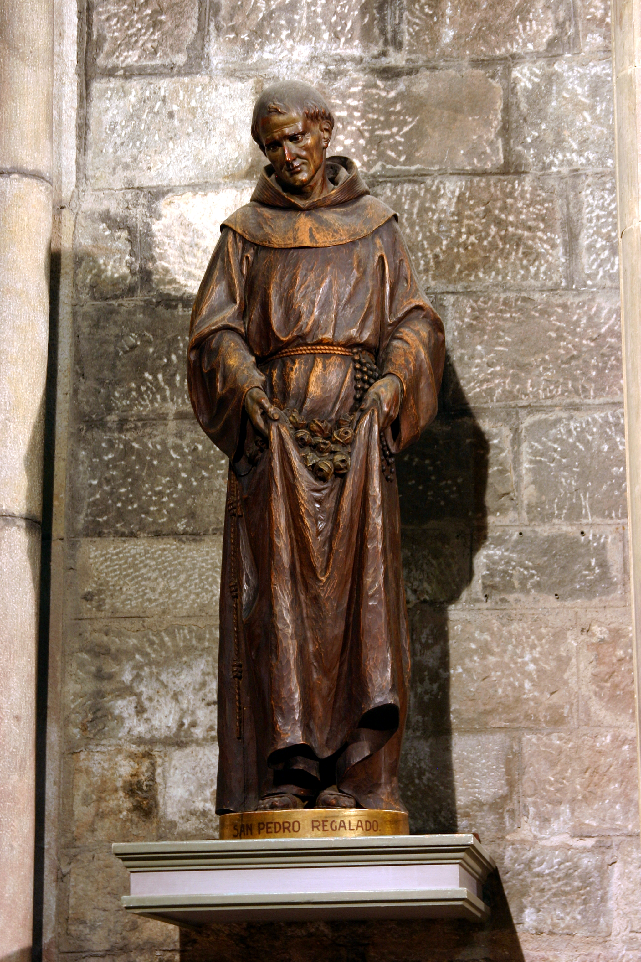 Santa Maria del Pi